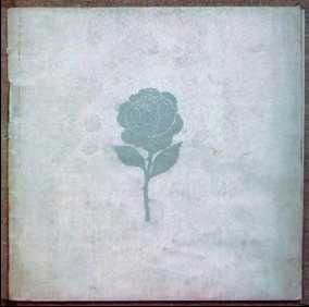 Обложка каталога выставки "Голубая роза" 1907